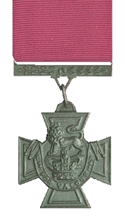 Victoriakreuz